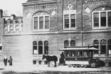 Площа митна 2а. кінка на площі митній у львові